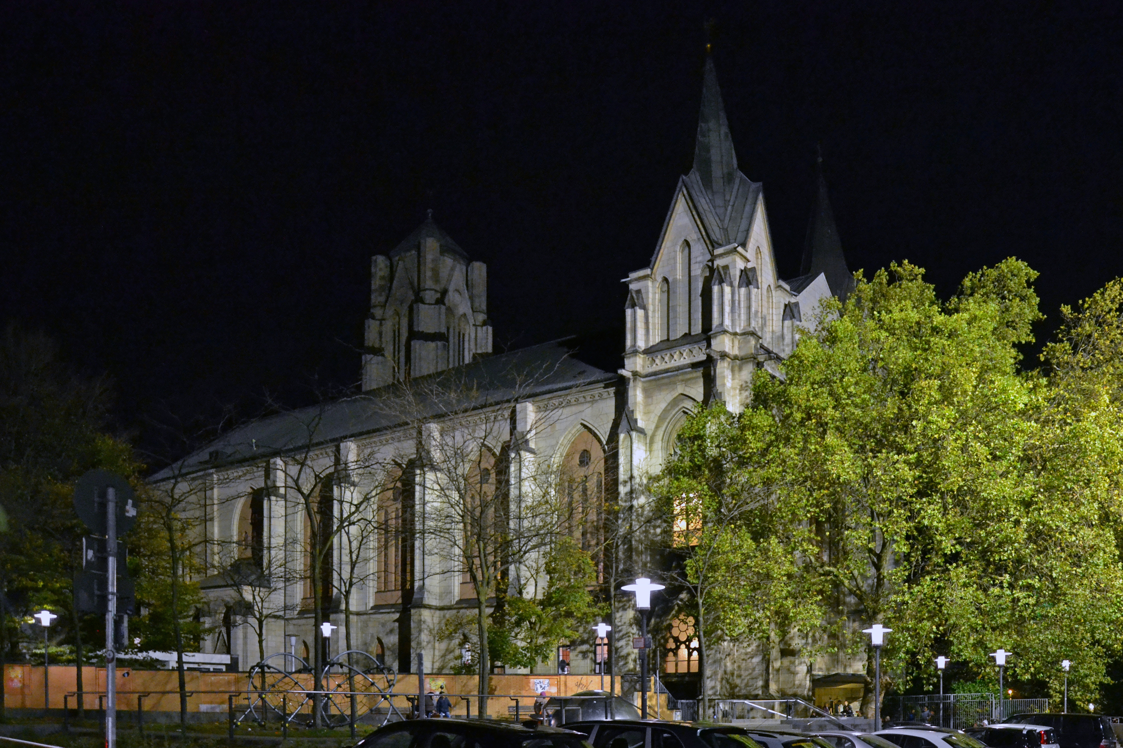 St. Gertrudis (Essen), Ansicht von Südost